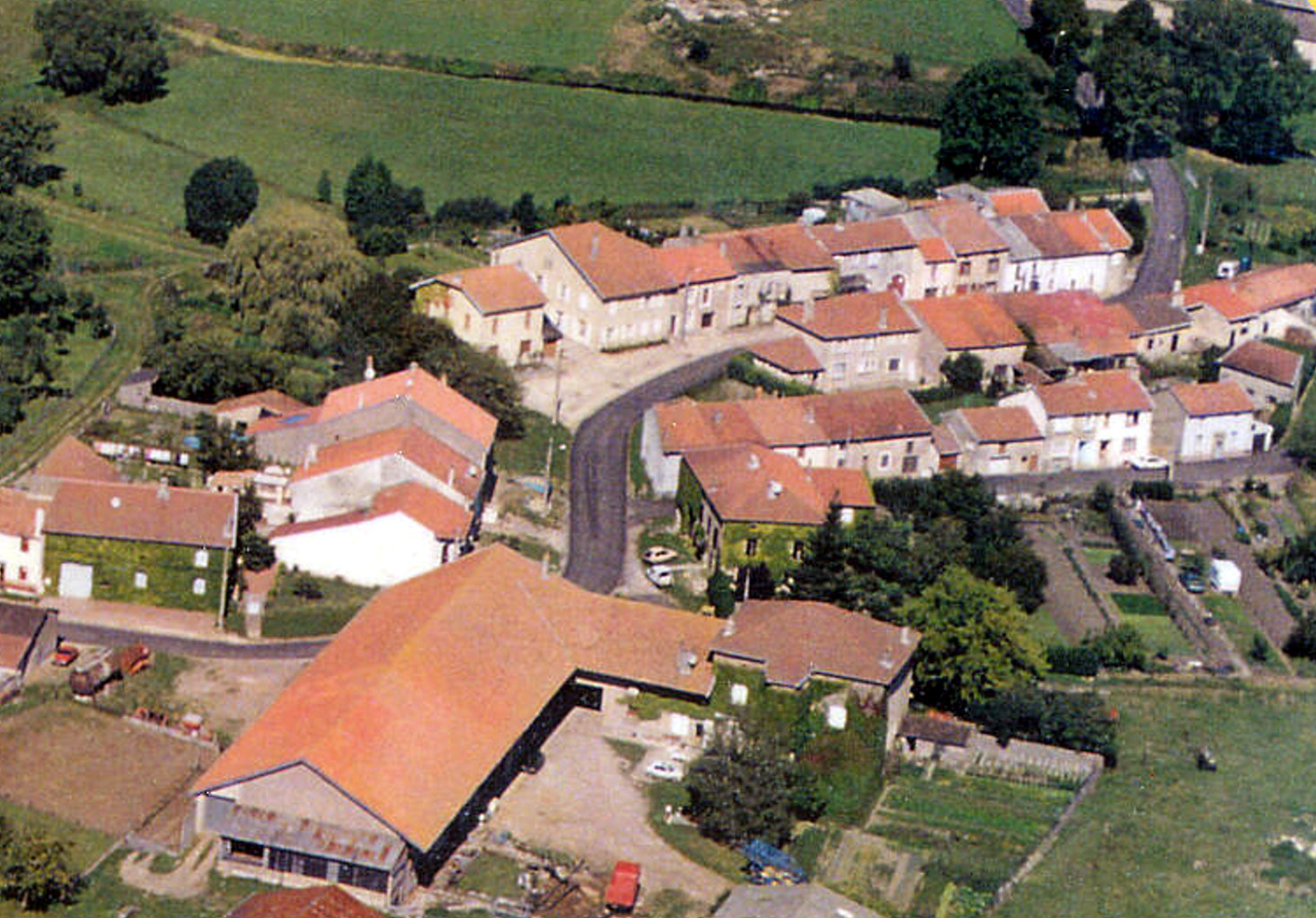 Salonnes